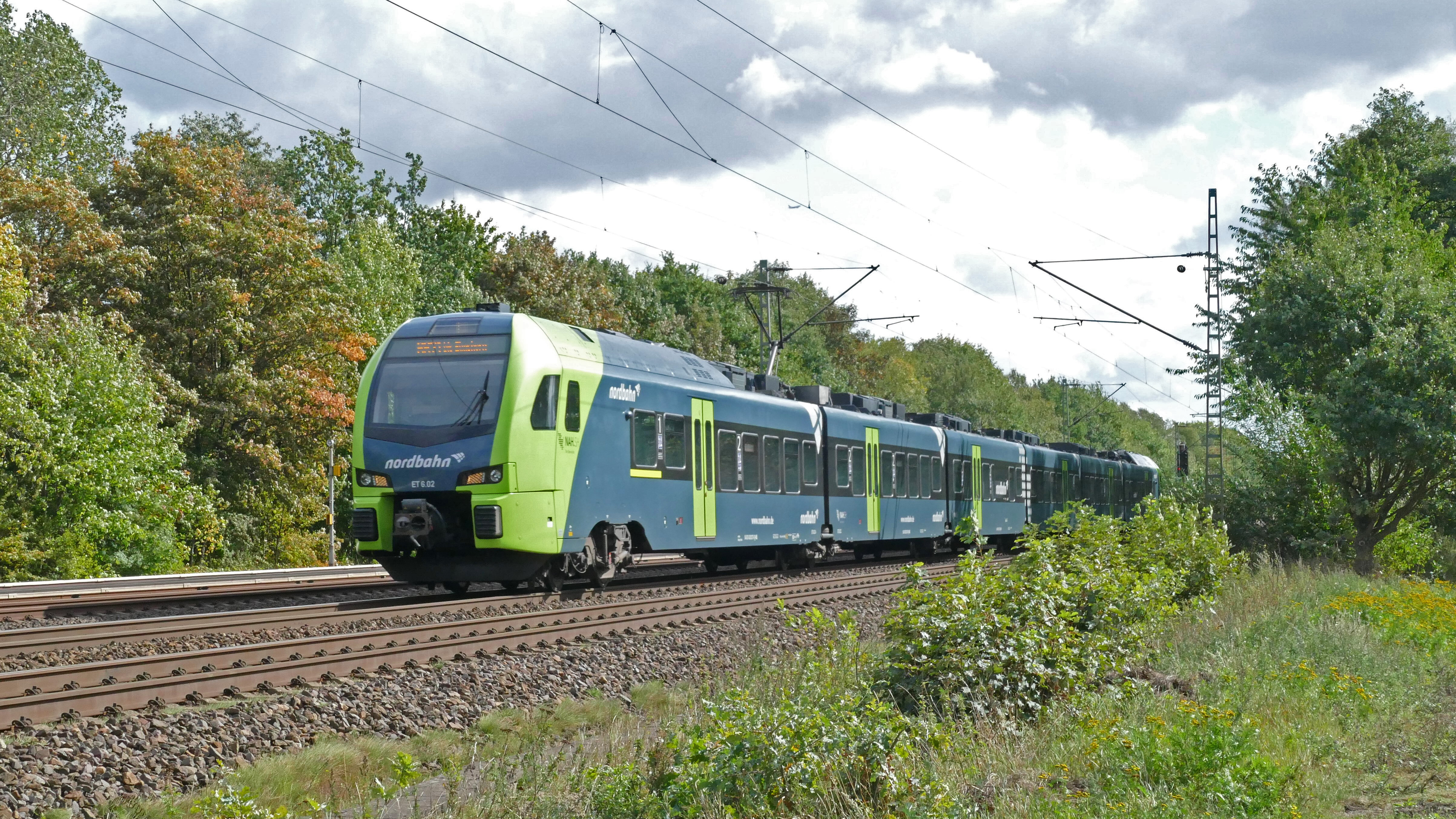 Eine RB71 nach Elmshorn der Nordbahn zwischen Halstenbek und Krupunder